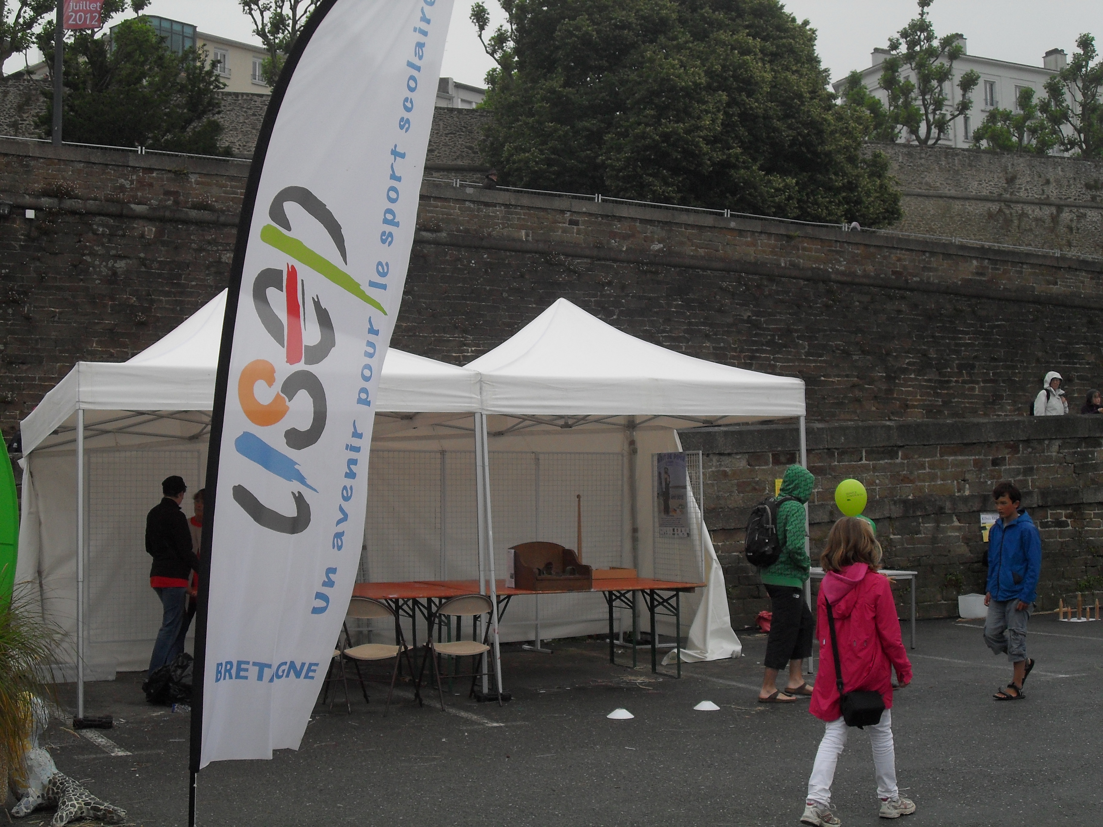 Stand USEP